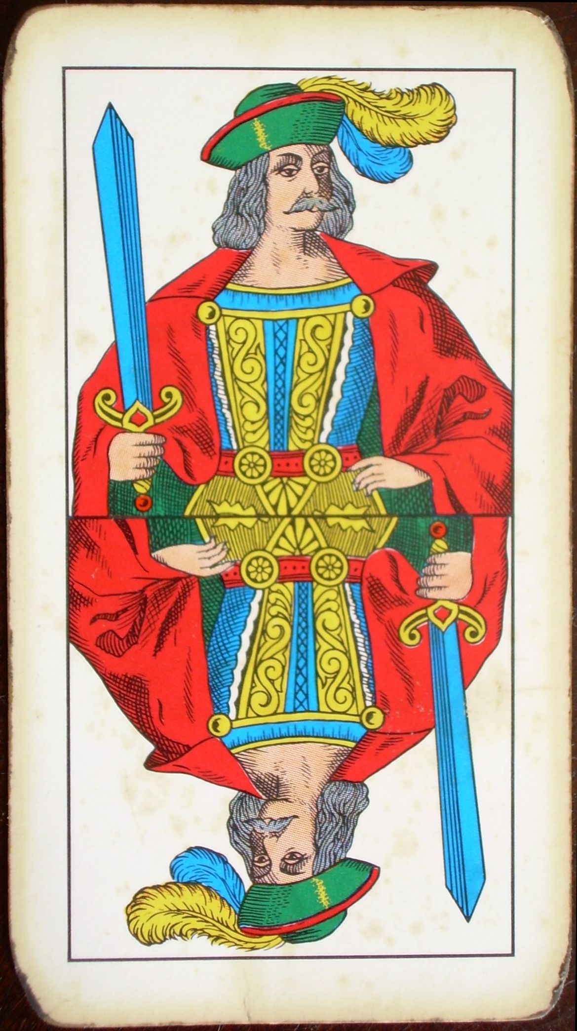 Carta del fante di spade del tipo "piacentine"